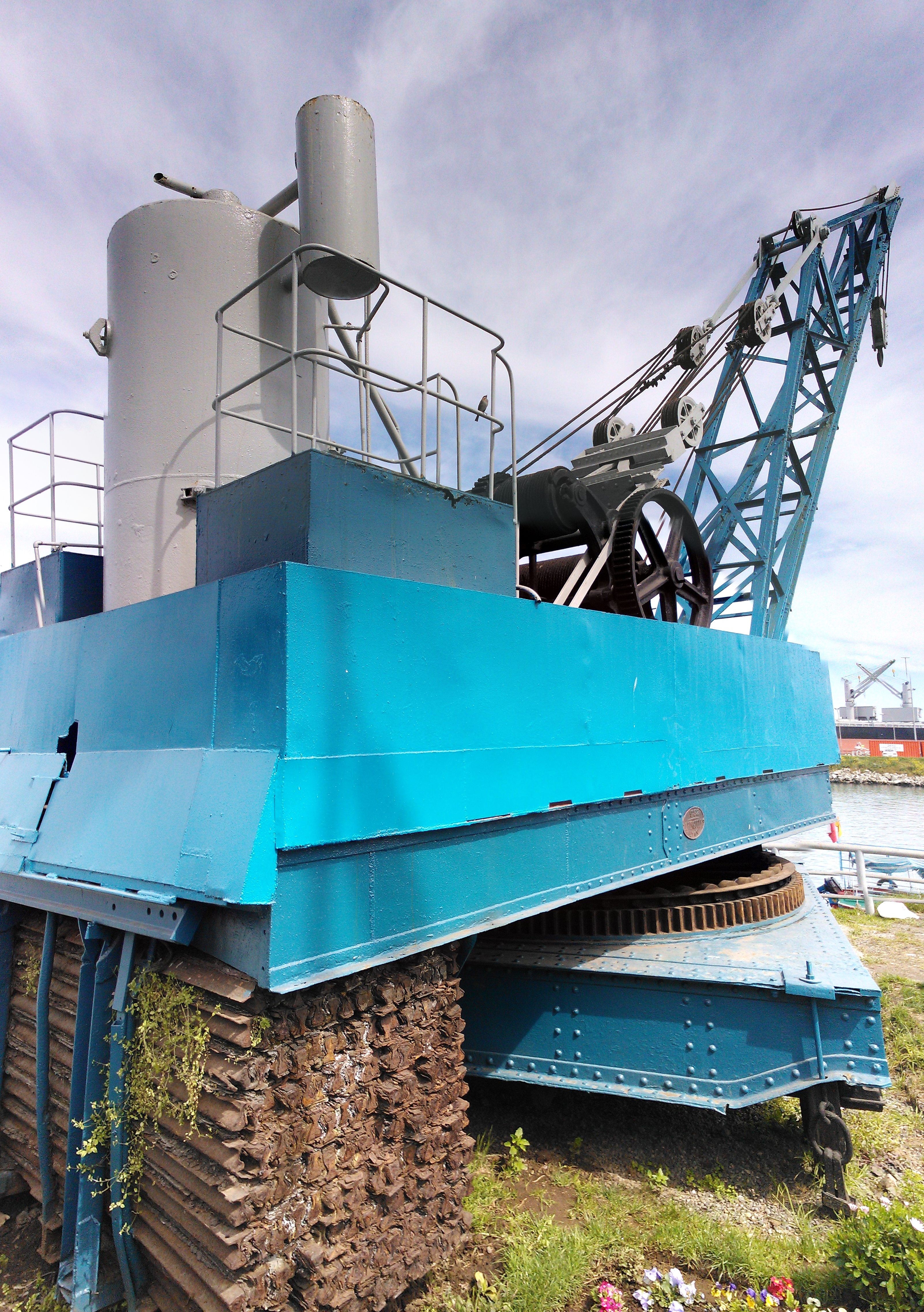 Grúa 82, puerto de San Antonio This is a photo of a national monument in Chile: 632